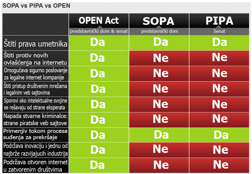 Ispravljena verzija prve slike poredjenja OPEN-a, sa SOPA-om i PIPA-om...